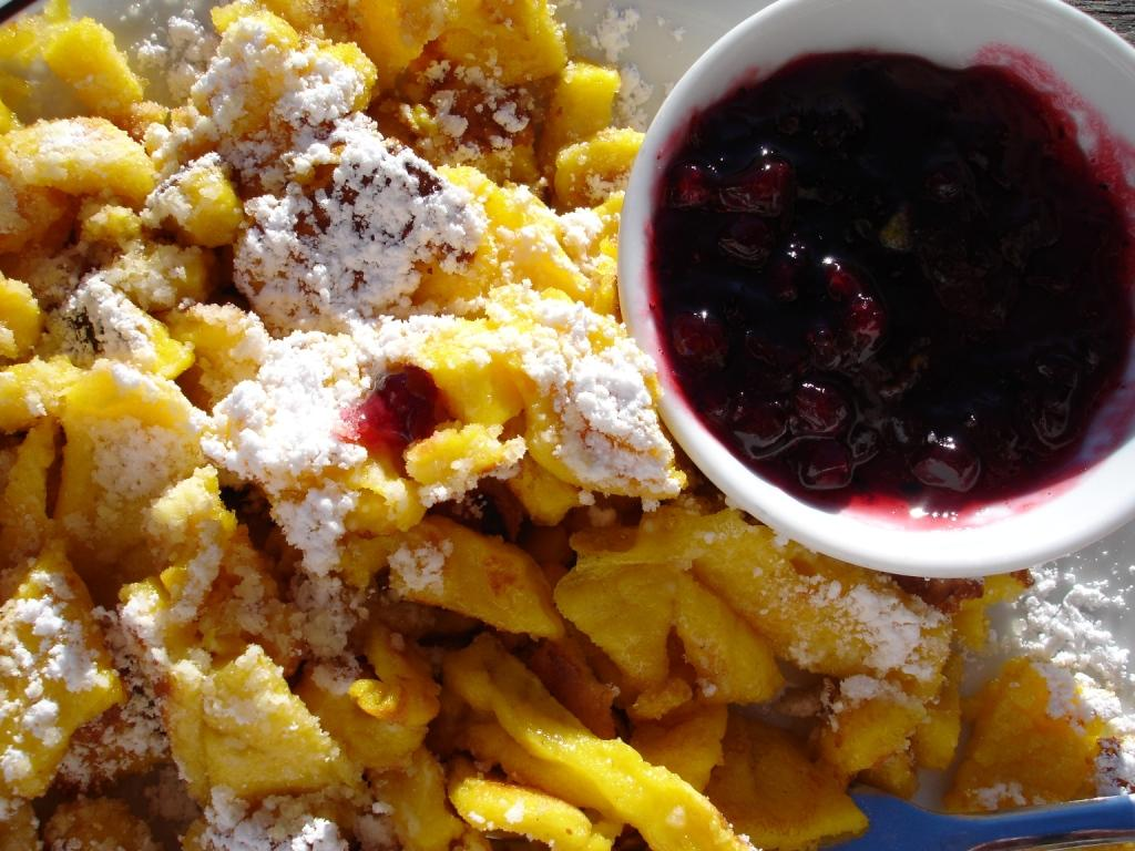 Serviervorschlag für Kaiserschmarrn